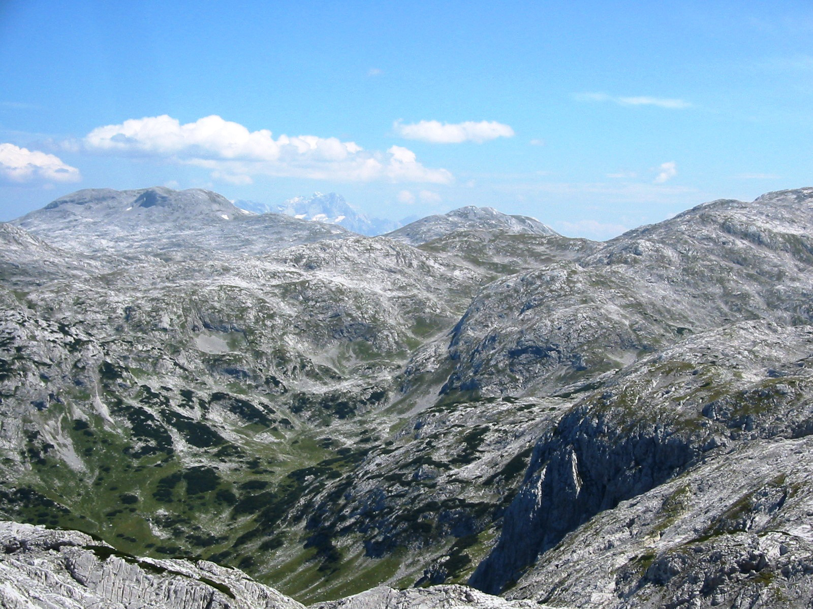 Blick auf die beeindruckende Karstfläche des Tennengebirges, Richtung Südost. Im Hintergrund: Das Dachsteinmassiv